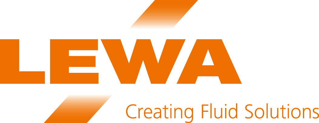 Logo von LEWA